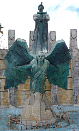 Imagén del monumente de frente